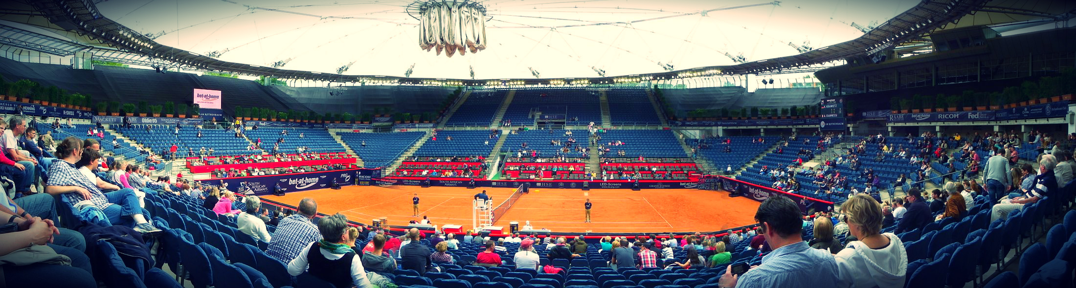 Tennis am Rothenbaum/Hamburg